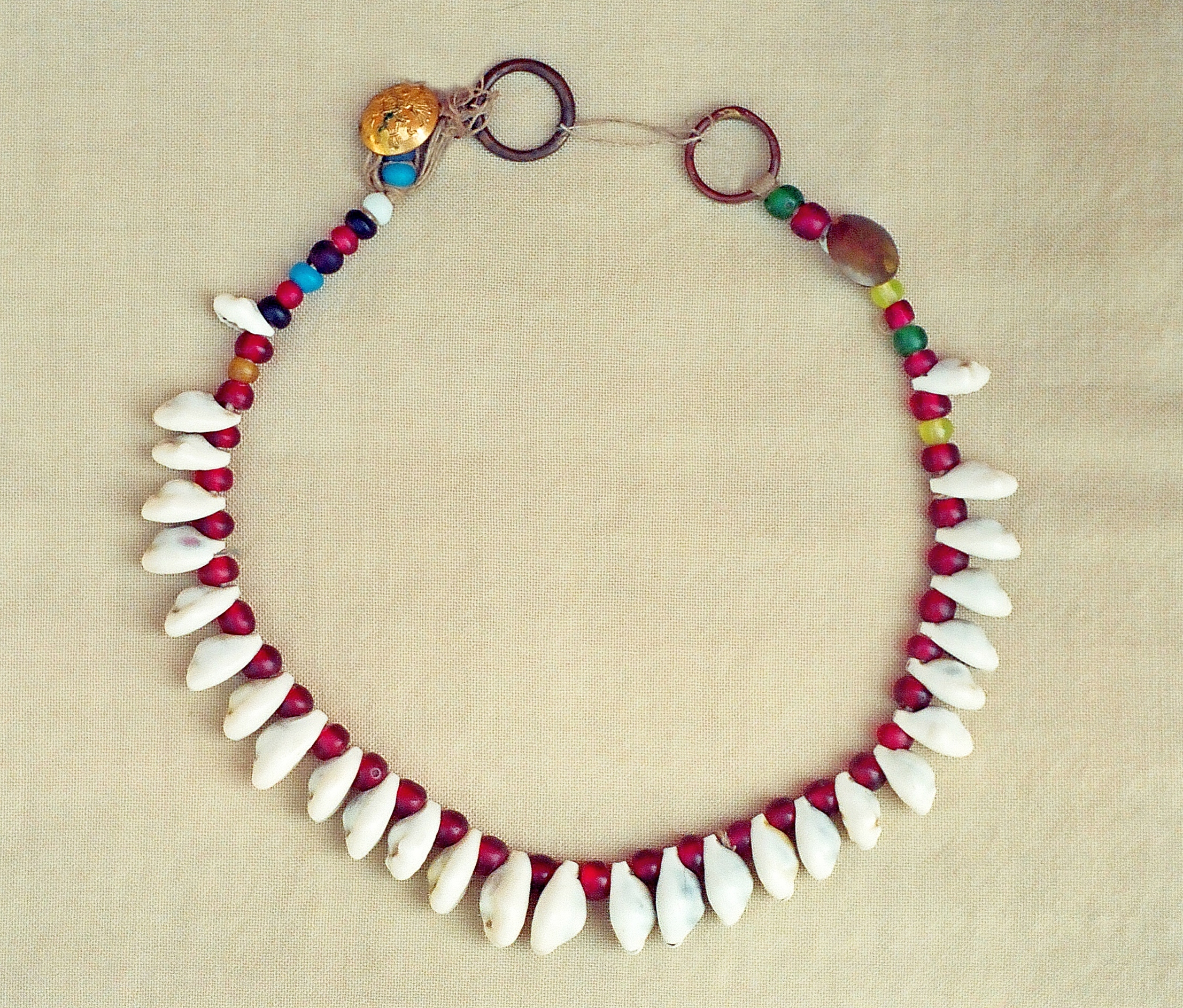 Чувашское нагрудное украшение. Конец XIX века. Раковины каури, бусы, пуговицы, кольцо. Фотография выполнена Г.Н. Ивановым в экспедиции в Самарскую обл., д. Карамалы. Чуваши Самарской Луки. Июль 1993 г.